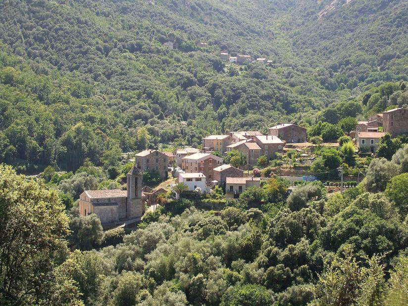 Corsu: I dui paisoli d'Arburi: Mercolaccia inghjò è Parapoghju insù.